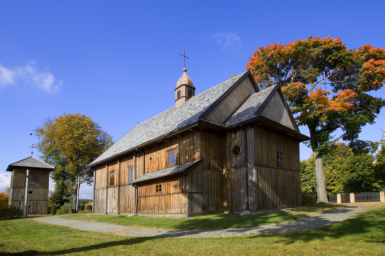 Kościół parafialny p.w. św. Stanisława Biskupa i Męczennika w Milejczycach